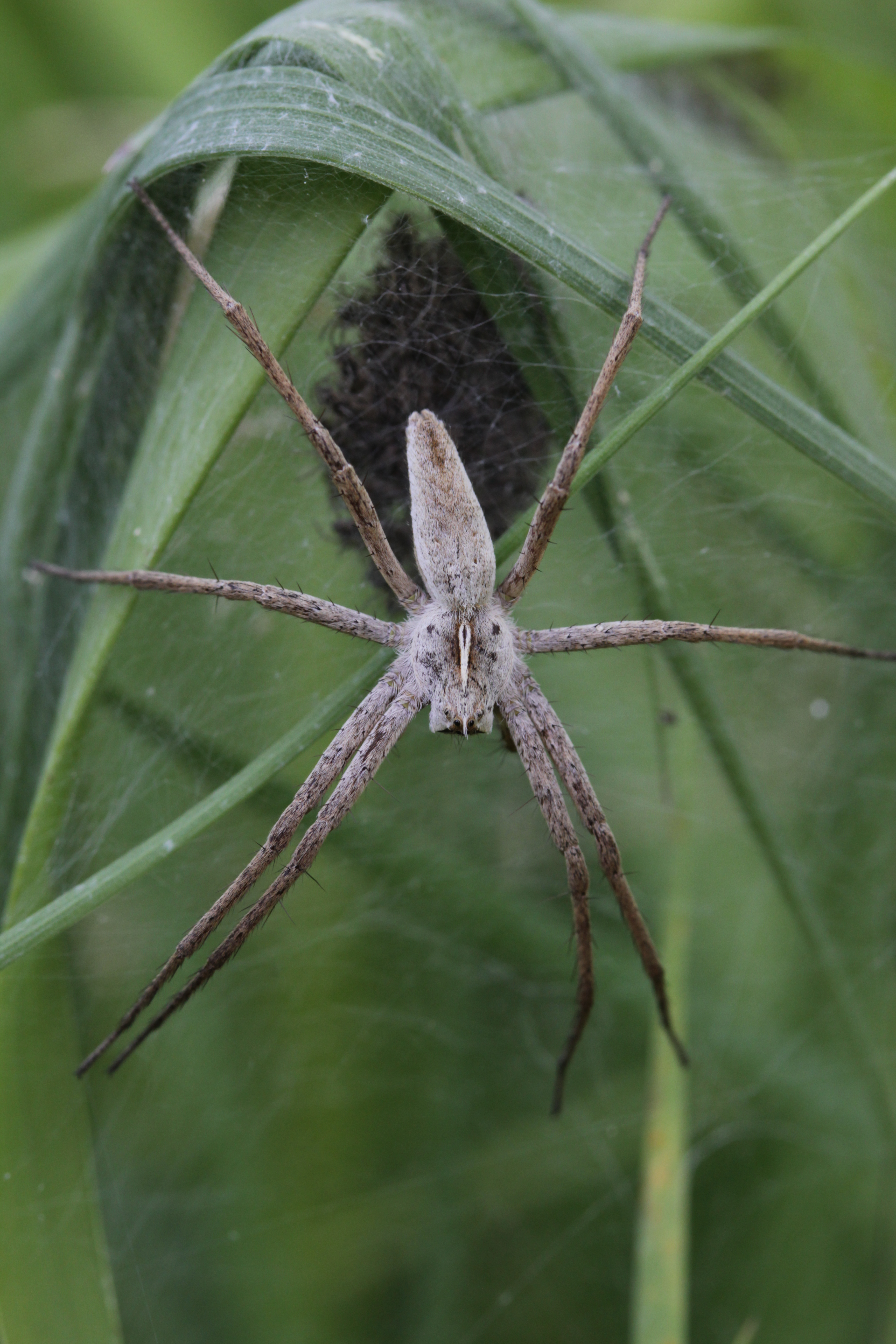 Nursery Web Spider - Pisaura mirabilis